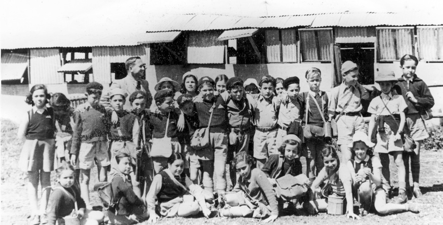 עמנואל יפה עם תלמידיו; 1946 - ביהס הריאלי